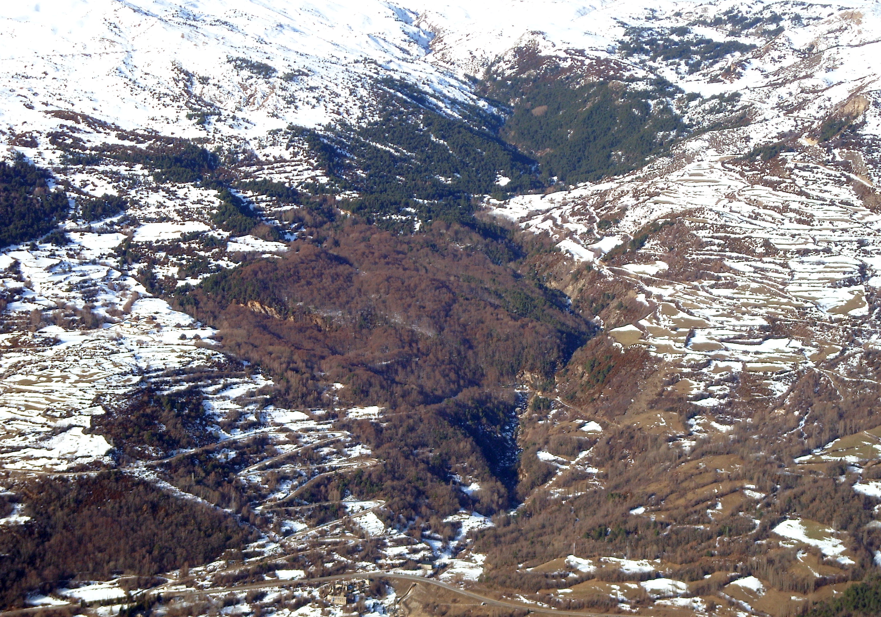 Aragonés: O Betato